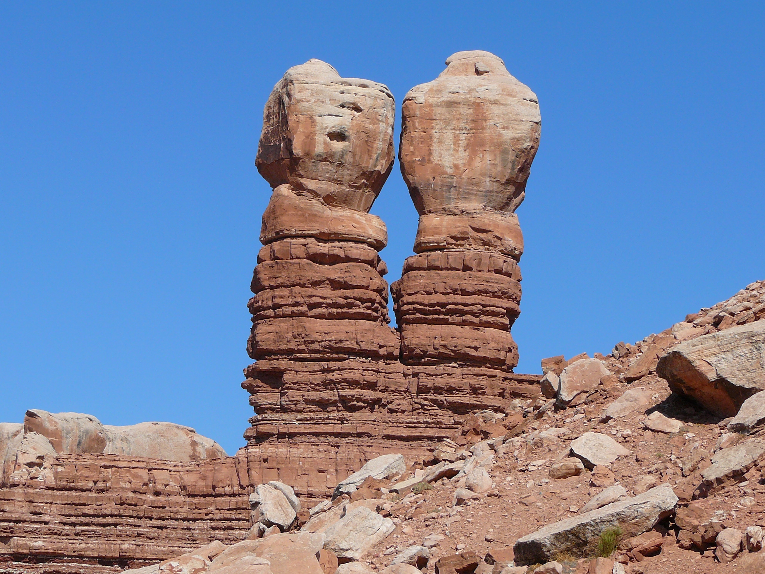 Formation rocheuse Navajo Twin Rocks située à Bluff dans l'état de l'Utah aux Etats-Unis d'Amérique